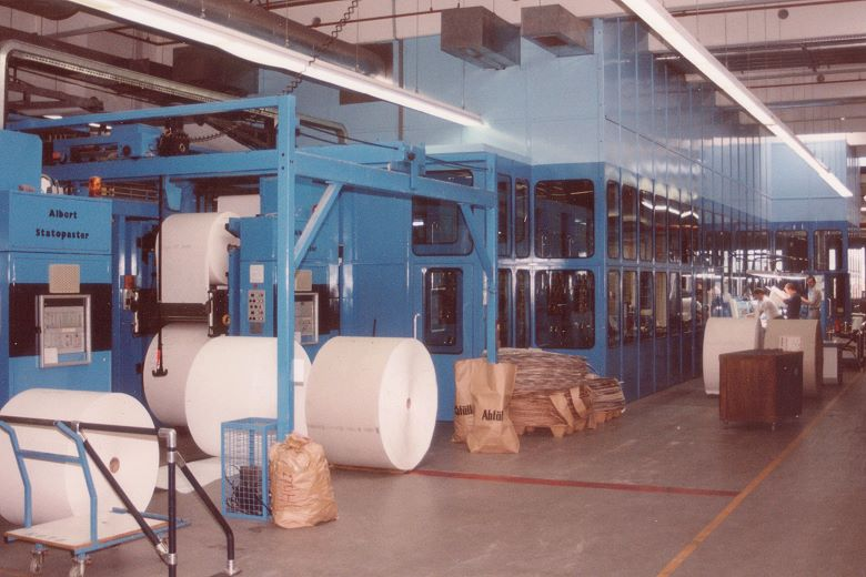 Rollenoffset-Druckmaschine der Zeugen Jehovas in ihrer Deutschlandzentrale in Niederselters. Eigene Aufnahme bei einer Führung im Jahr 1991 durch das 'Bethel' der Zeugen Jehovas.